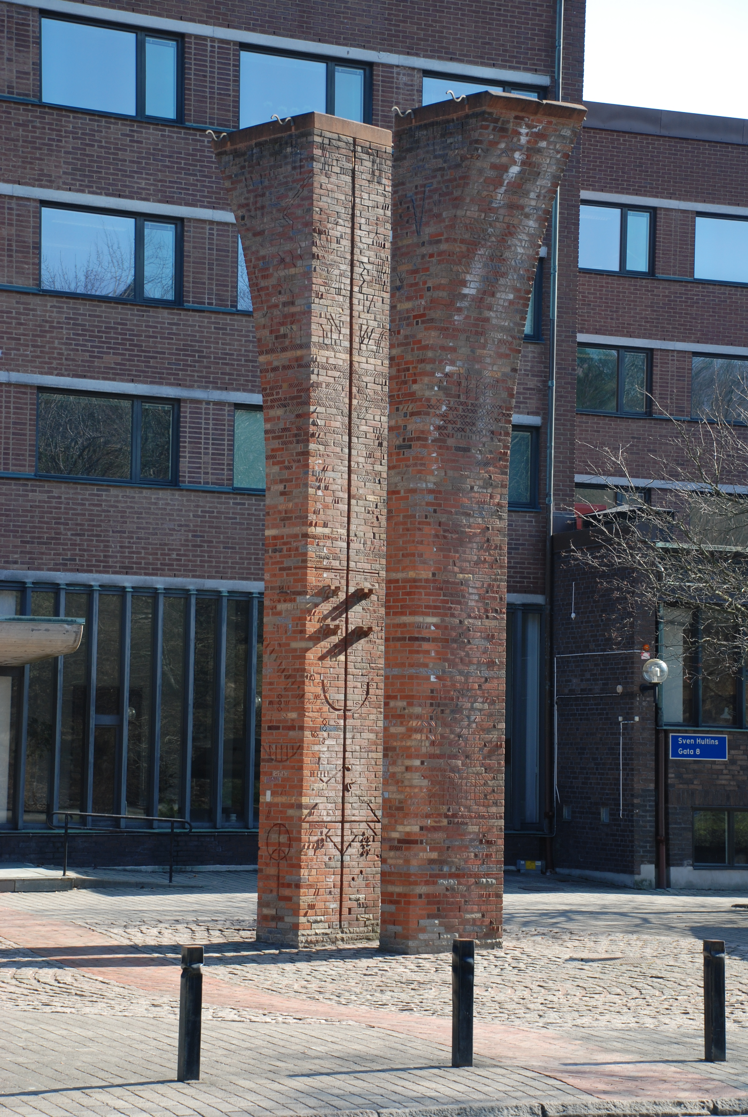 Skulpturen bränt tegel av Lillemor Petersson. Placerad längs Sven Hultins Gata, Chalmers, stadsdelen Johanneberg, i Göteborg. Utförd 1990. Beställd av Statens Konstråd, ägs och förvaltas av Akademiska Hus Väst AB.